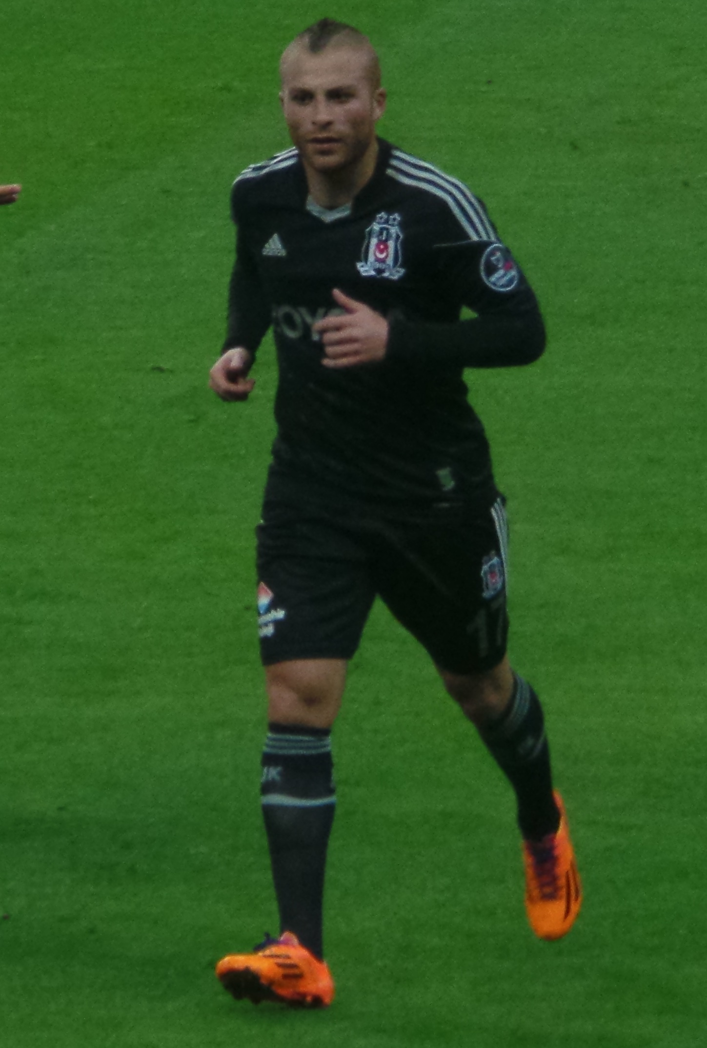 Gökhan Töre